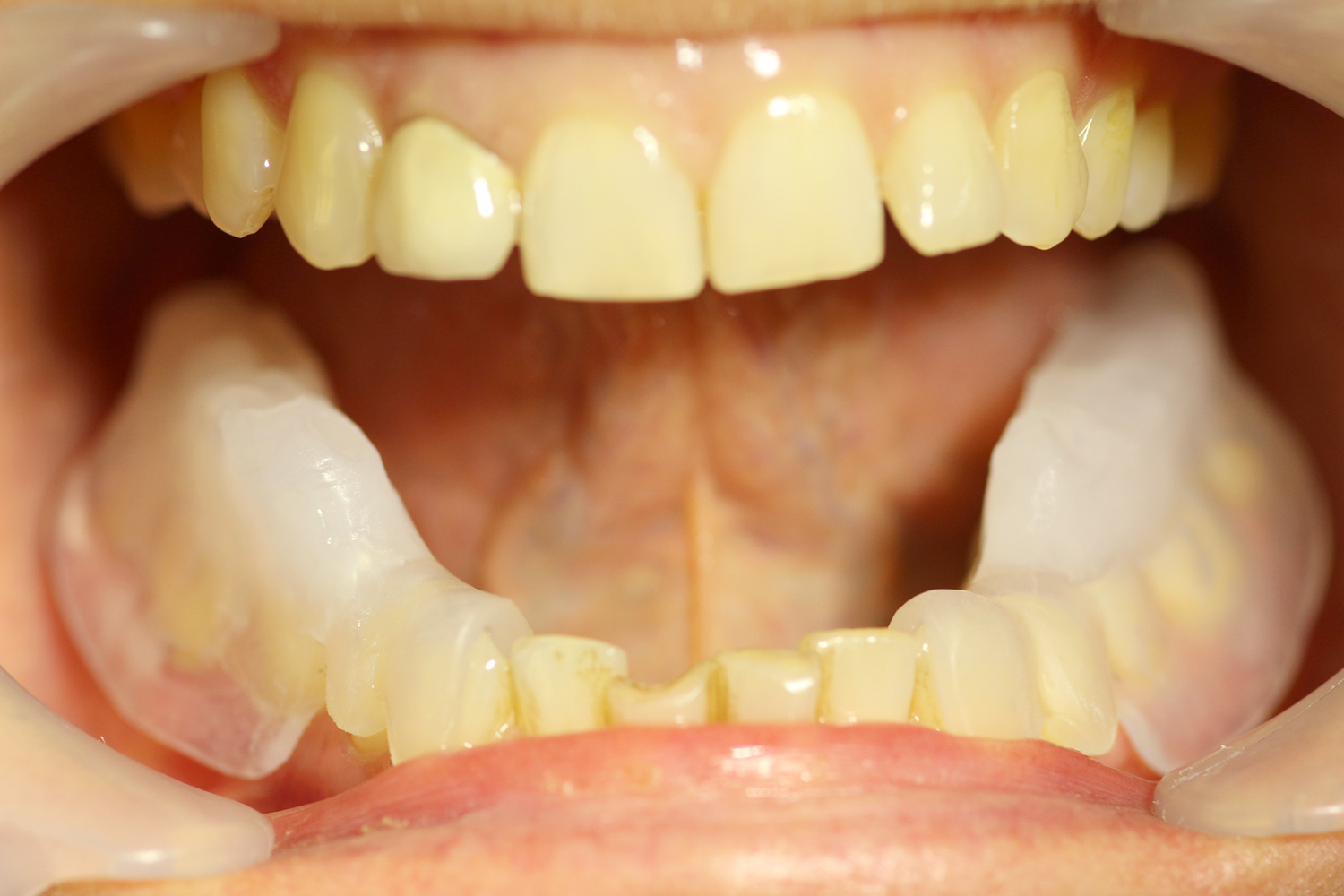 Balance-Schiene nach Reinhardt am Patienten Bild 2